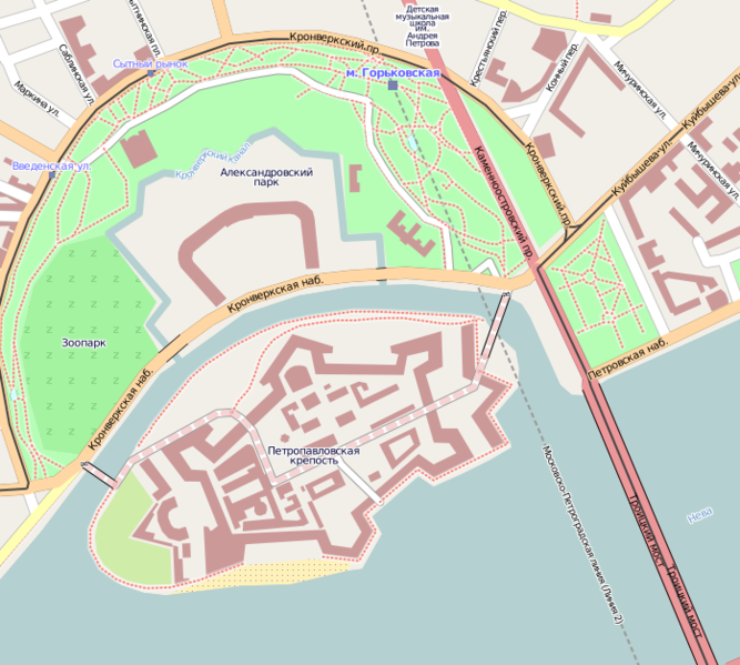 Haseninsel